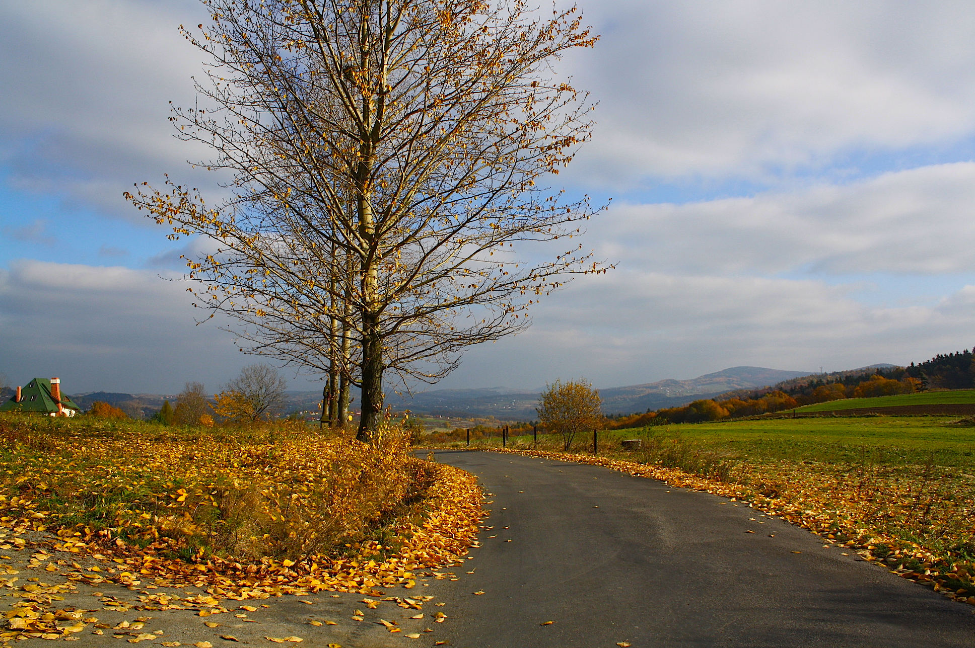 Śleszowice, droga w stronę Mucharza/Śleszowice, the road towards Mucharz